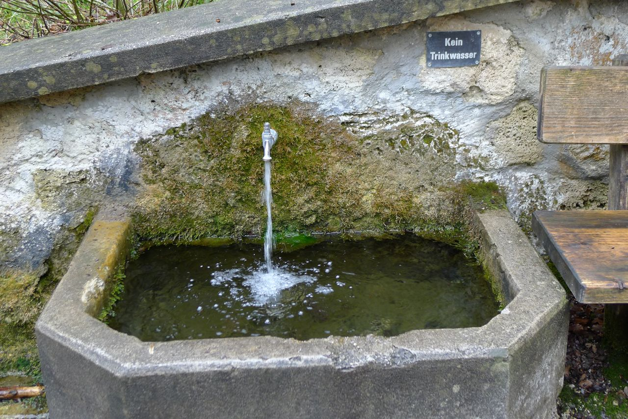 Brunnen, nach dem die Wallfahrtskapelle Nüchternbrunn ihren Namen hat. Eine der Quellen des Farnbachs